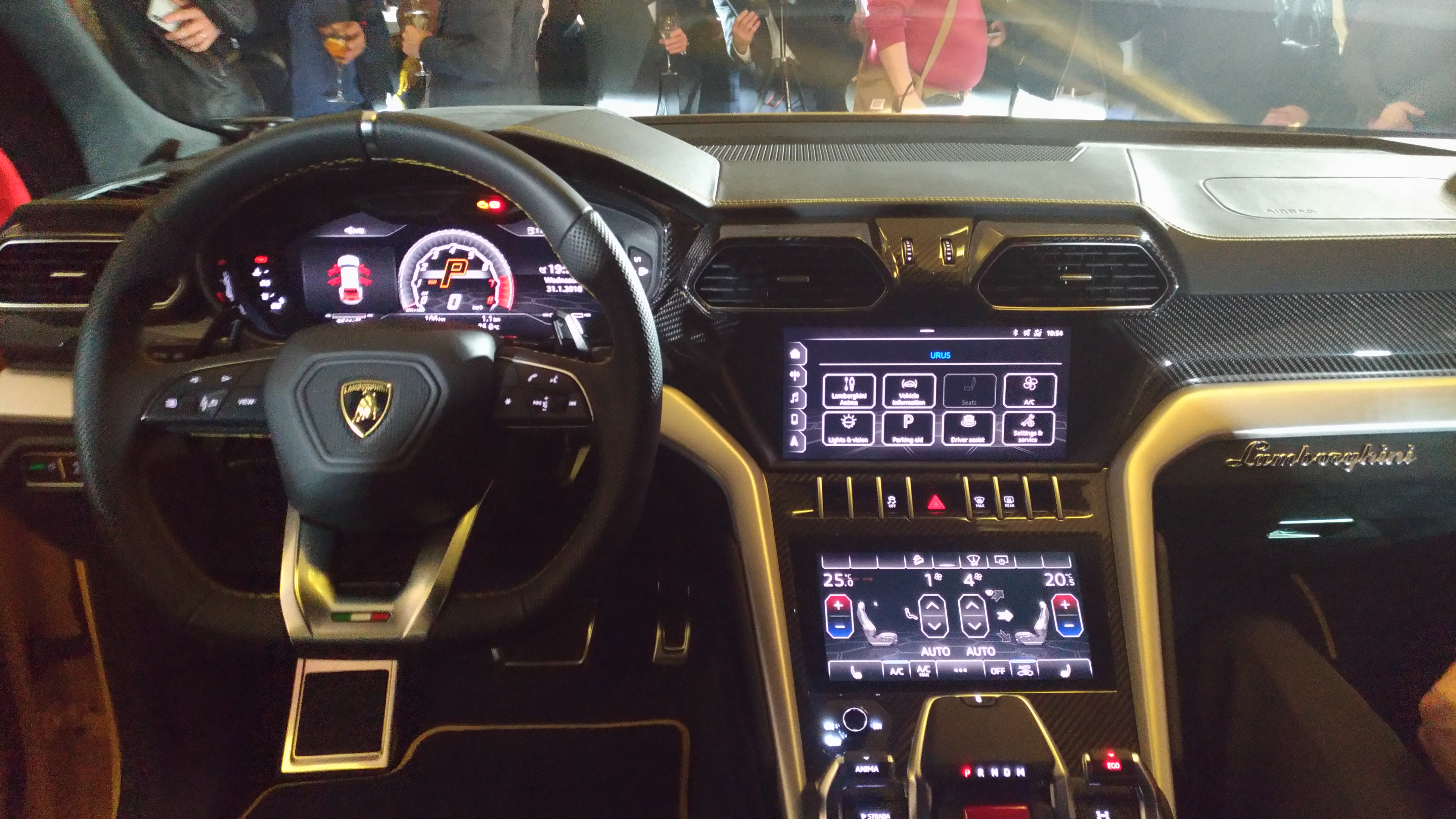 Lamborghini Urus soirée inaugurale concession Lamborghini Paris